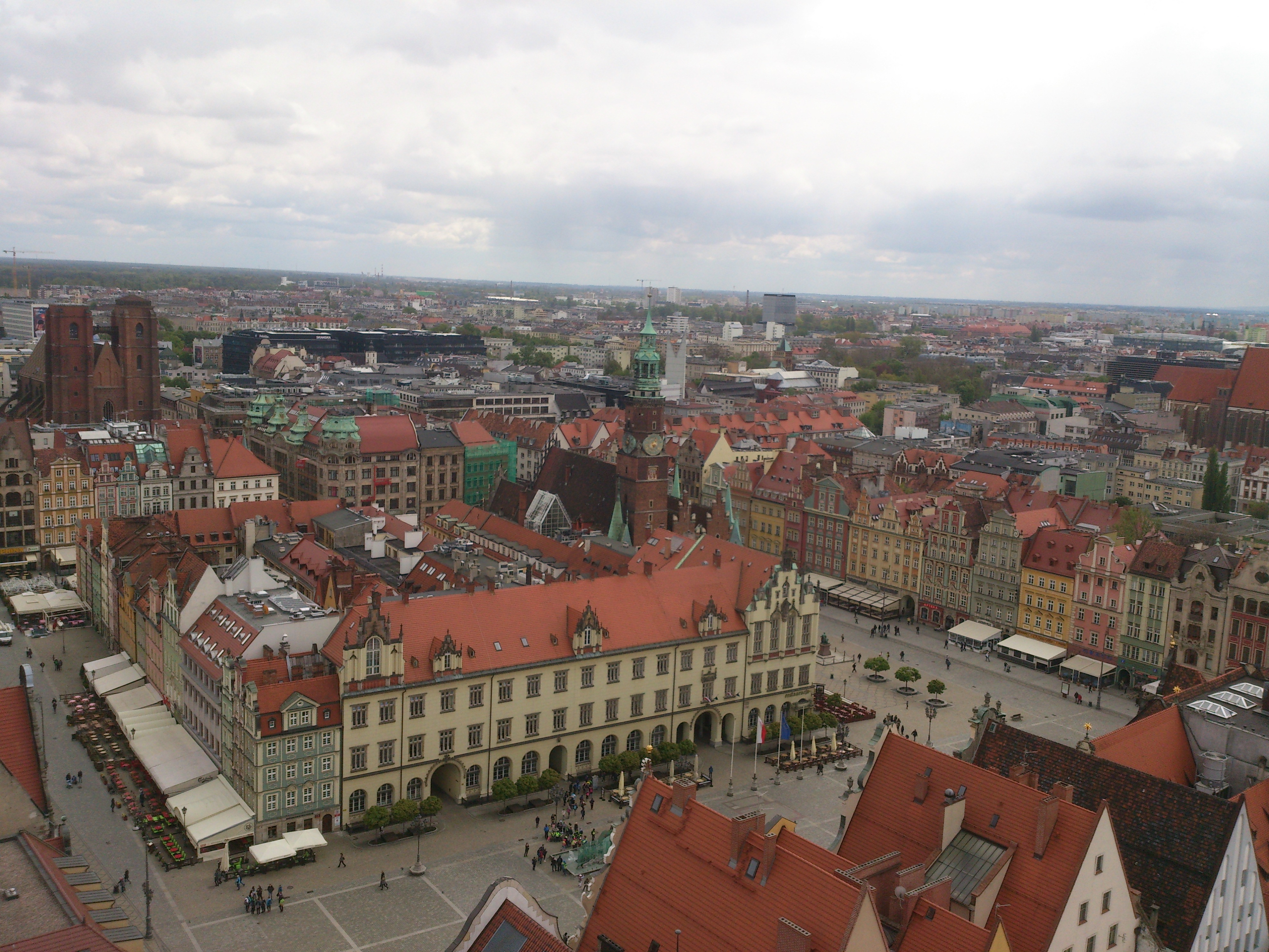 폴란드 브로츠와프 구시가지